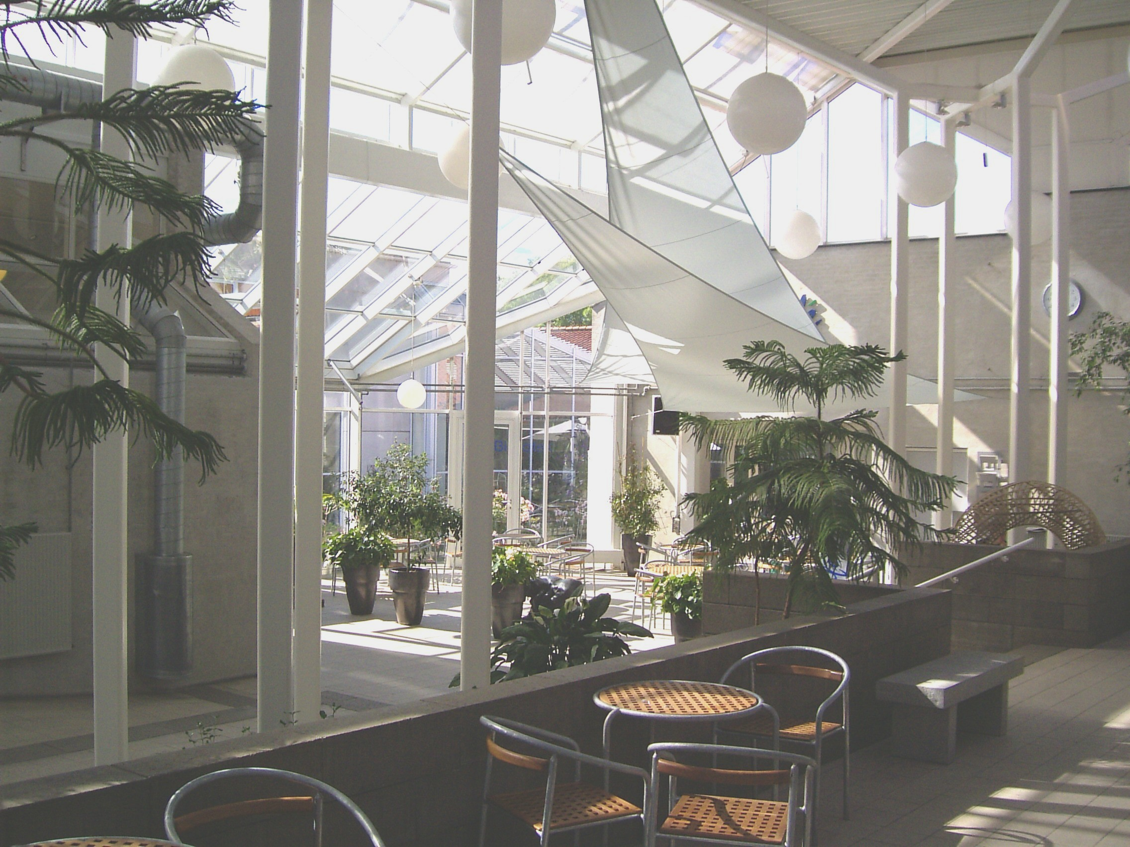 Kulturhuset, Farum Kommune. Café-miljøet.